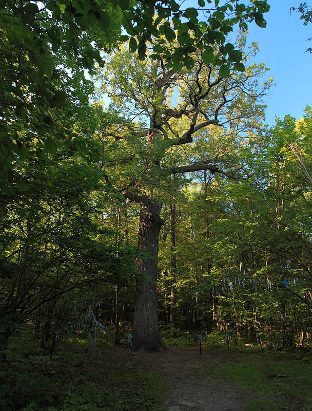 Дуб черешчатый: национальный парк Марий Чодра, в 5 км на юго-восток от санатория "Кленовая Гора", Волжский район, Марий Эл This image is related to the protected area of Russia number 1290026